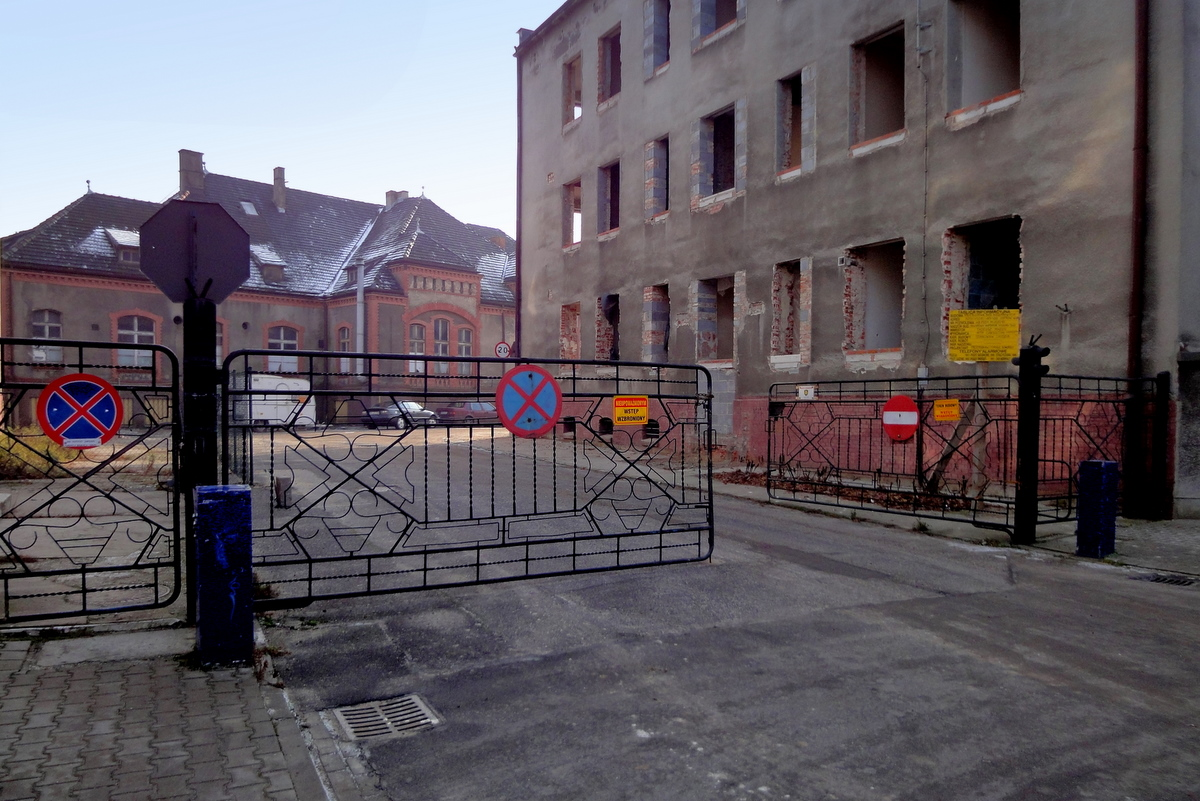 Przebudowa byłych koszar - 2010 r.